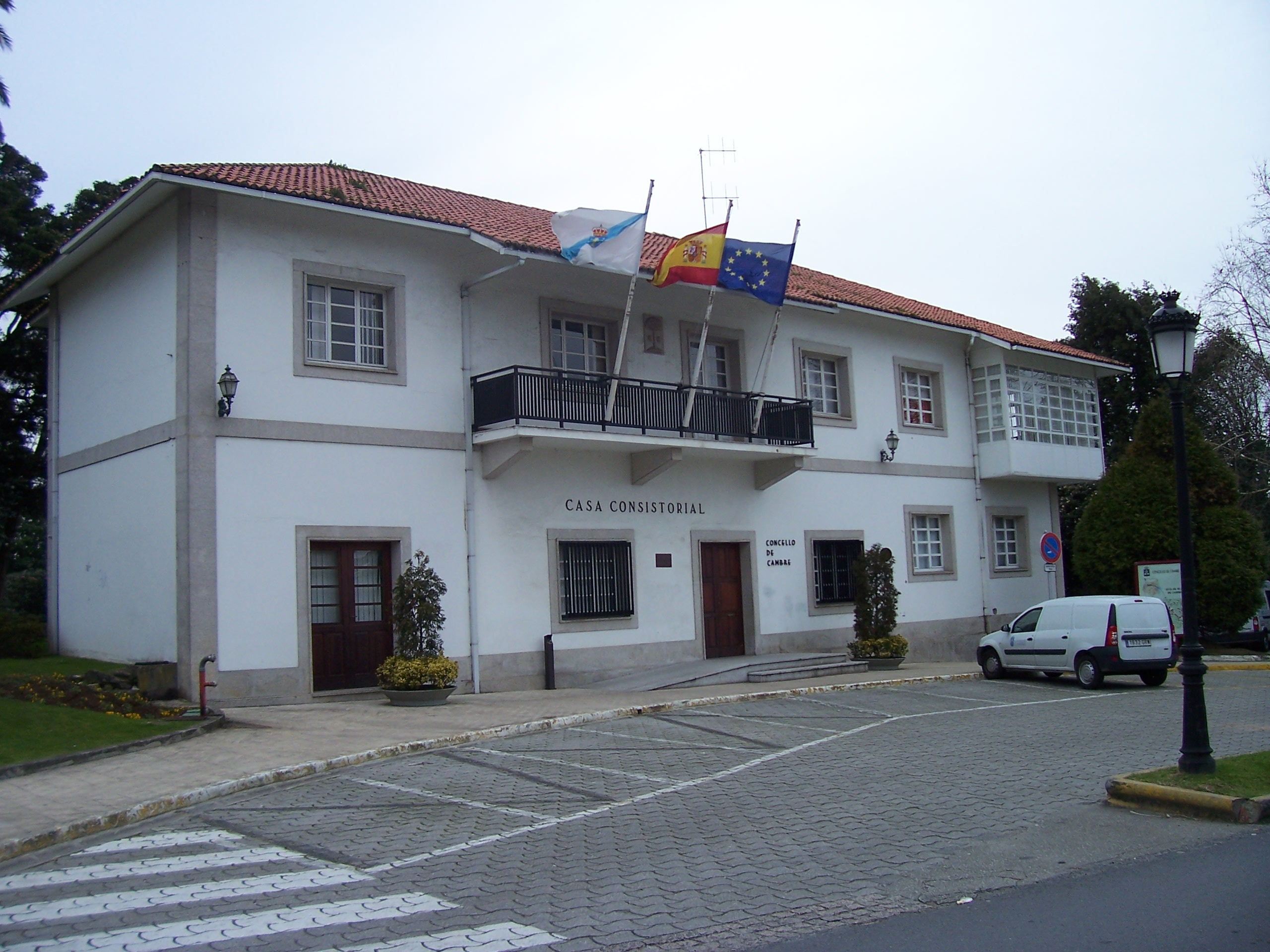 Edificio del ayuntamiento de Cambre, provincia de Coruña, España.